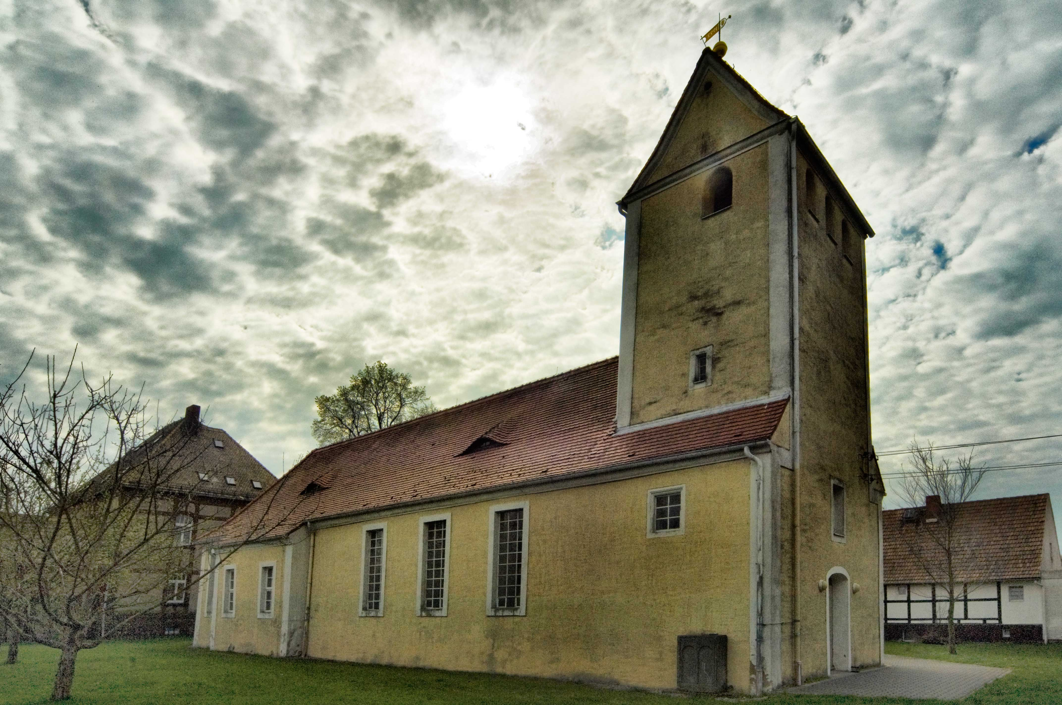 Ev.- Luth. Kirche Liptitz, Gemeinde Wermsdorf, Sachsen